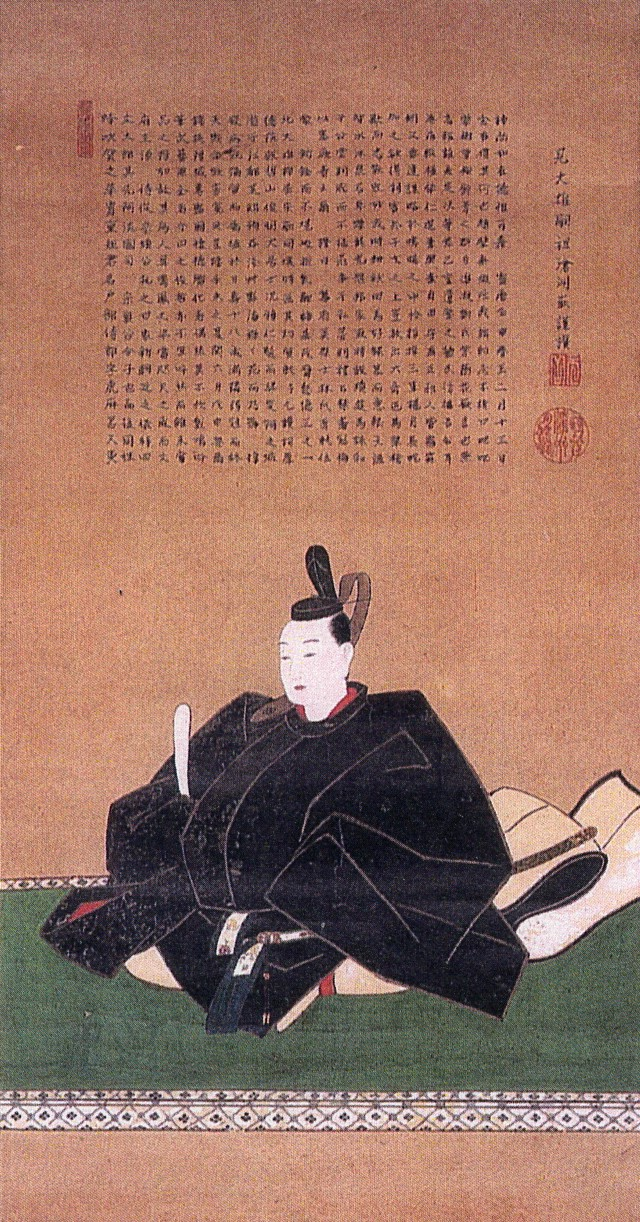 蜂須賀重矩(6代藩主蜂須賀宗員の次男)の肖像。